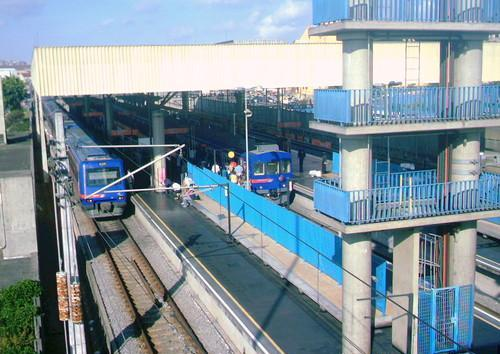 Estação Guaianases